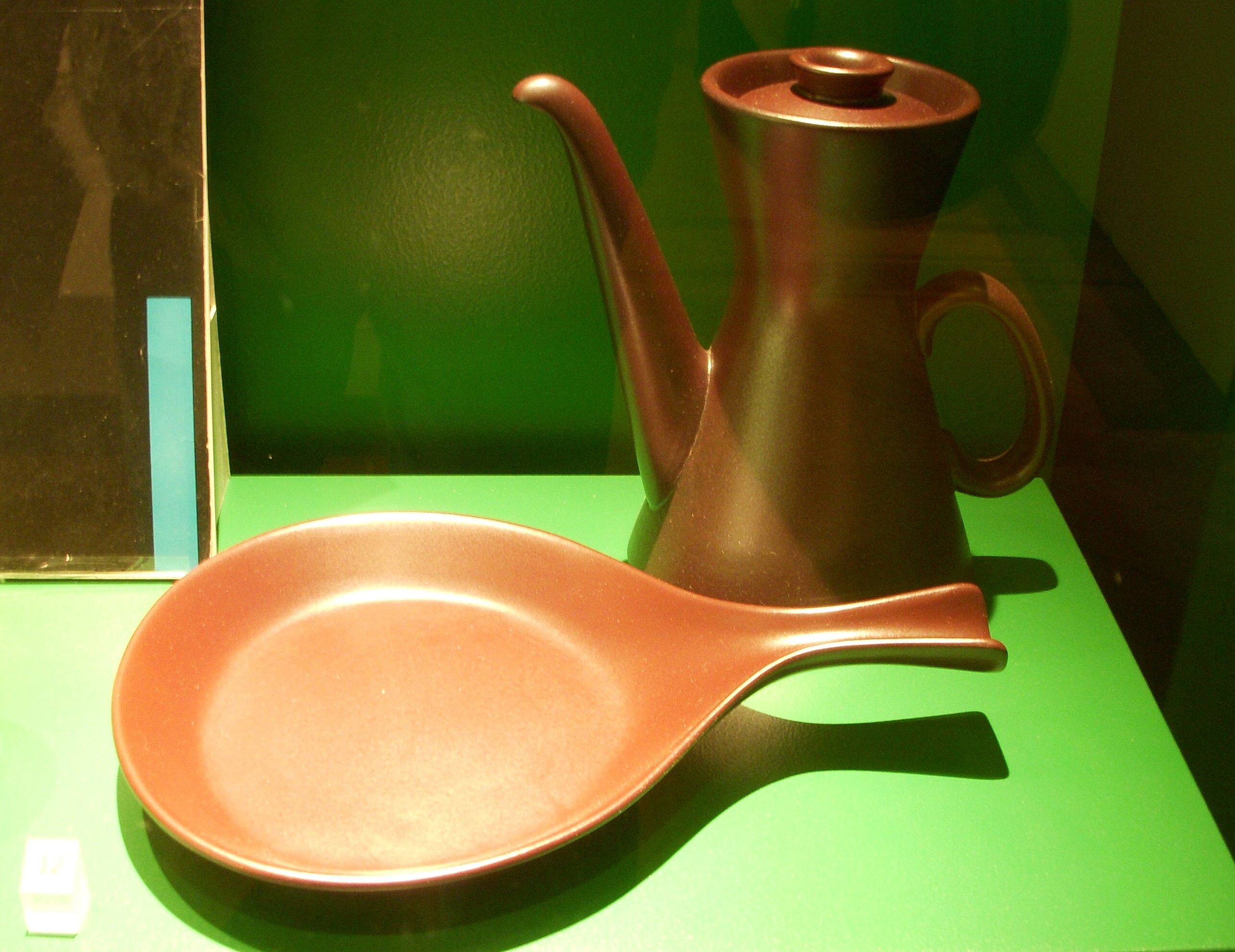 Stig Lindbergs eldfasta porslin "Terma"